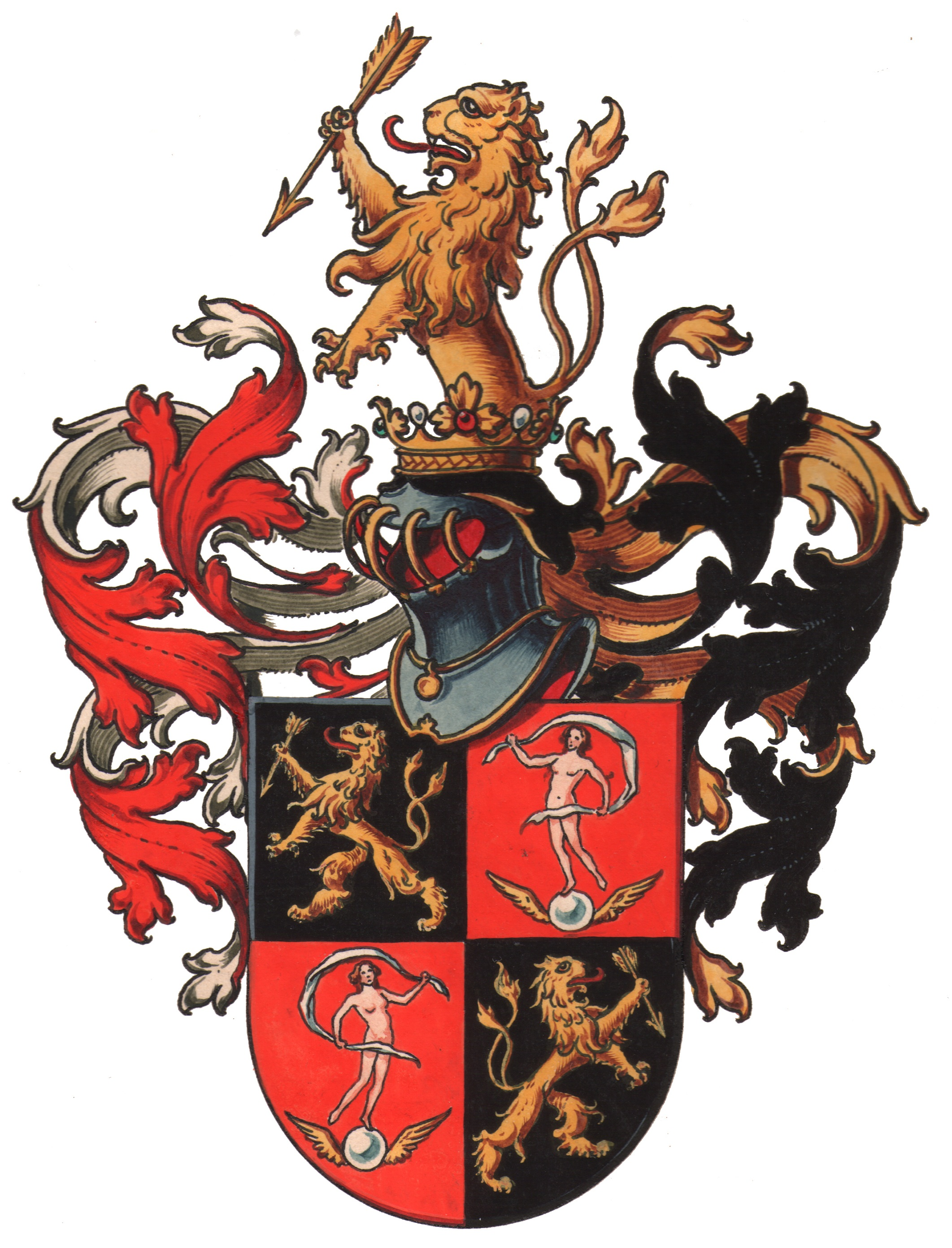 Grb Gregorja Voglarja.